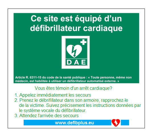 Signalétique d'information et de position SIBEL CORP